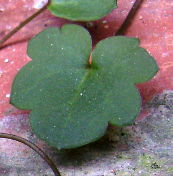 Fulla lobulada caracterísitca de Cymbalaria muralis